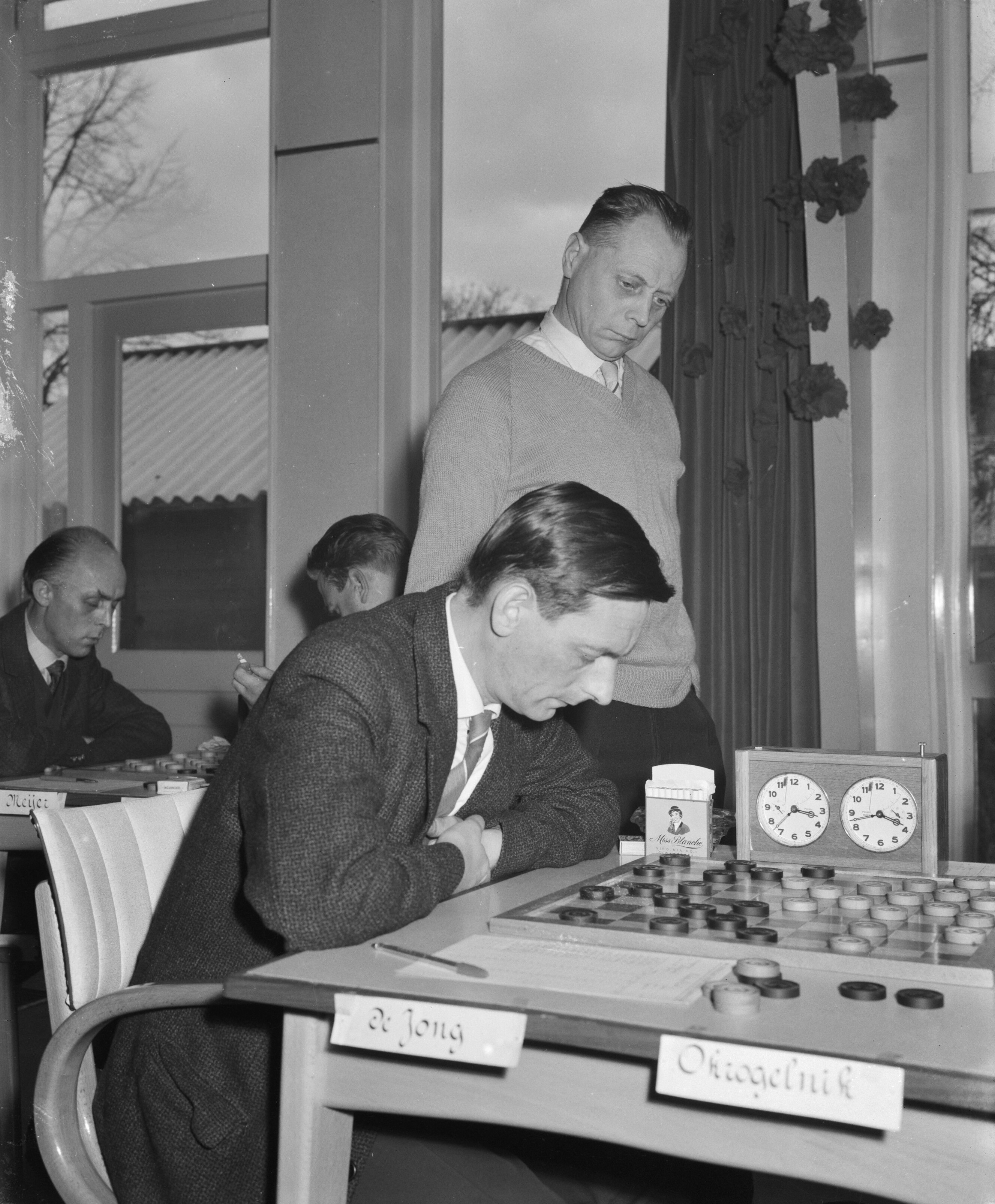 Collectie / Archief : Fotocollectie Anefo Reportage / Serie : [ onbekend ] Beschrijving : Persoonlijk damkampioenschap van Nederland, Bom bekijkt d partij van W. de Jong Datum : 27 februari 1960 Locatie : Nederland Trefwoorden : PARTIJEN, damkampioenschappen Persoonsnaam : Jong, W. de Fotograaf : Rossem, Wim van / Anefo Auteursrechthebbende : Nationaal Archief Materiaalsoort : Negatief (zwart/wit) Nummer archiefinventaris : bekijk toegang 2.24.01.04 Bestanddeelnummer : 911-0547